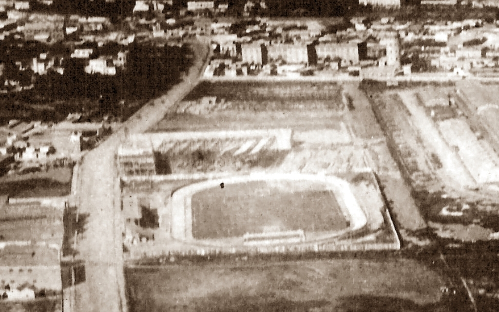 Estadio calle Arenas Huracan